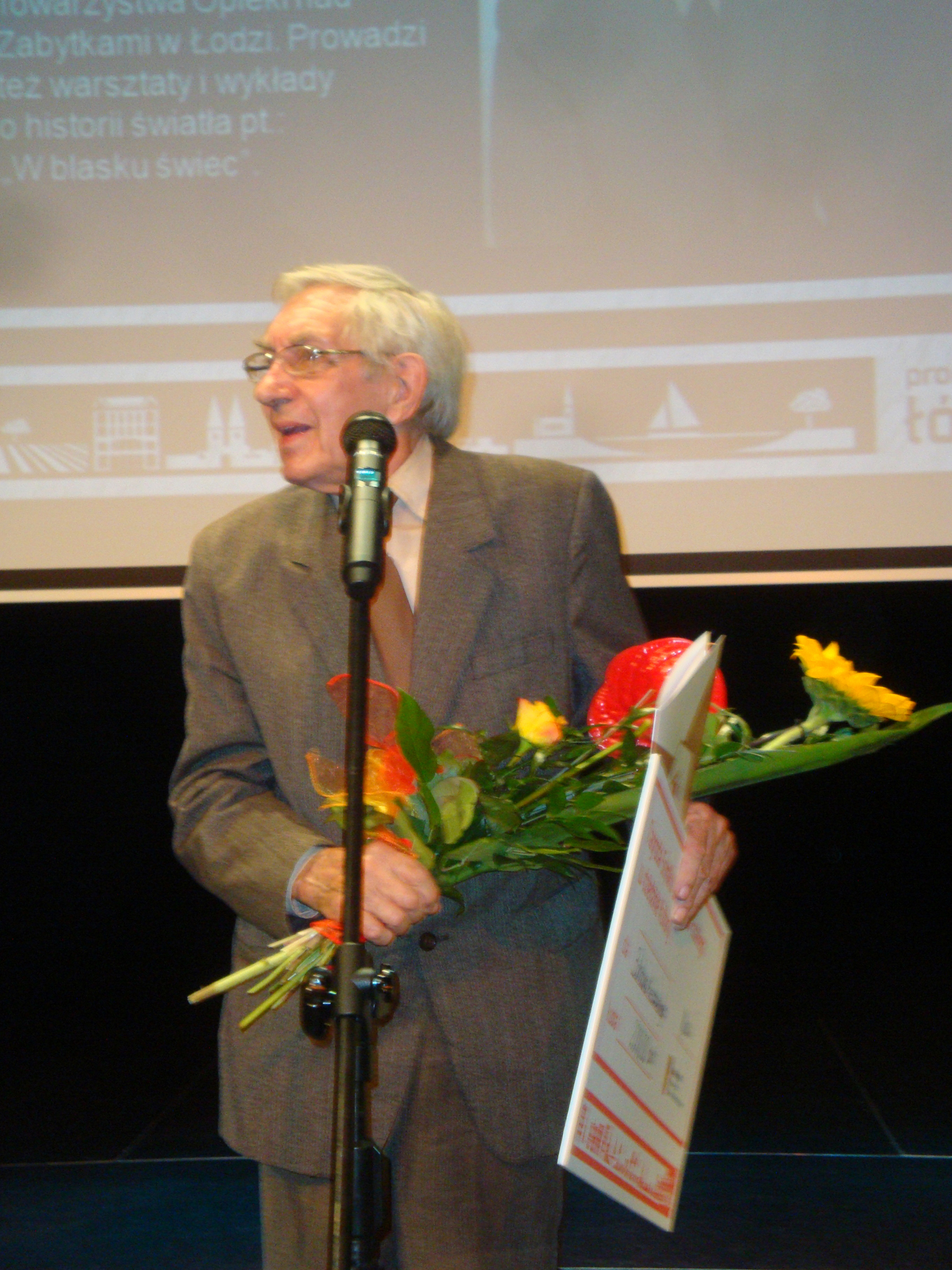 Nagrody Sejmiku Województwa Łódzkiego 16 października 2018 (9) Bohdan Kieszkowski - laureat nagrody indywidualnej ze Zgierza